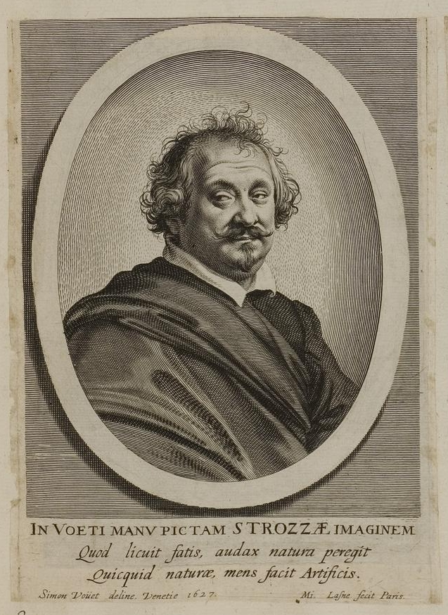 Grafik aus dem Klebeband Nr. 1 der Fürstlich Waldeckschen Hofbibliothek Arolsen Motiv: Giulio Strozzi